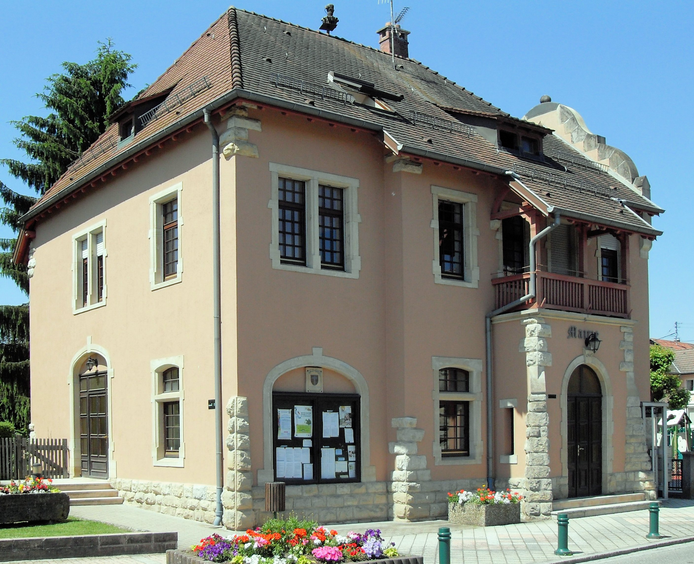 La mairie de Spechbach-le-Haut